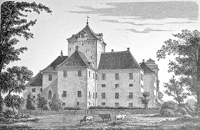 Gjorslev slot ligger i Holtug Sogn på Stevns. Præstø Amt, Denmark. Herregaarden Gjorslev er en af Landets ældste Gaarde, opført i Begyndelsen af det 15.Aarh. af Biskop i Roeskilde Peder Jensen Lodehat. 1793 købtes Gaarden af Etatsraad J. B. Scavenius og ejes nu af hans Sønnesøn Kammerherre J. F. Scavenius.